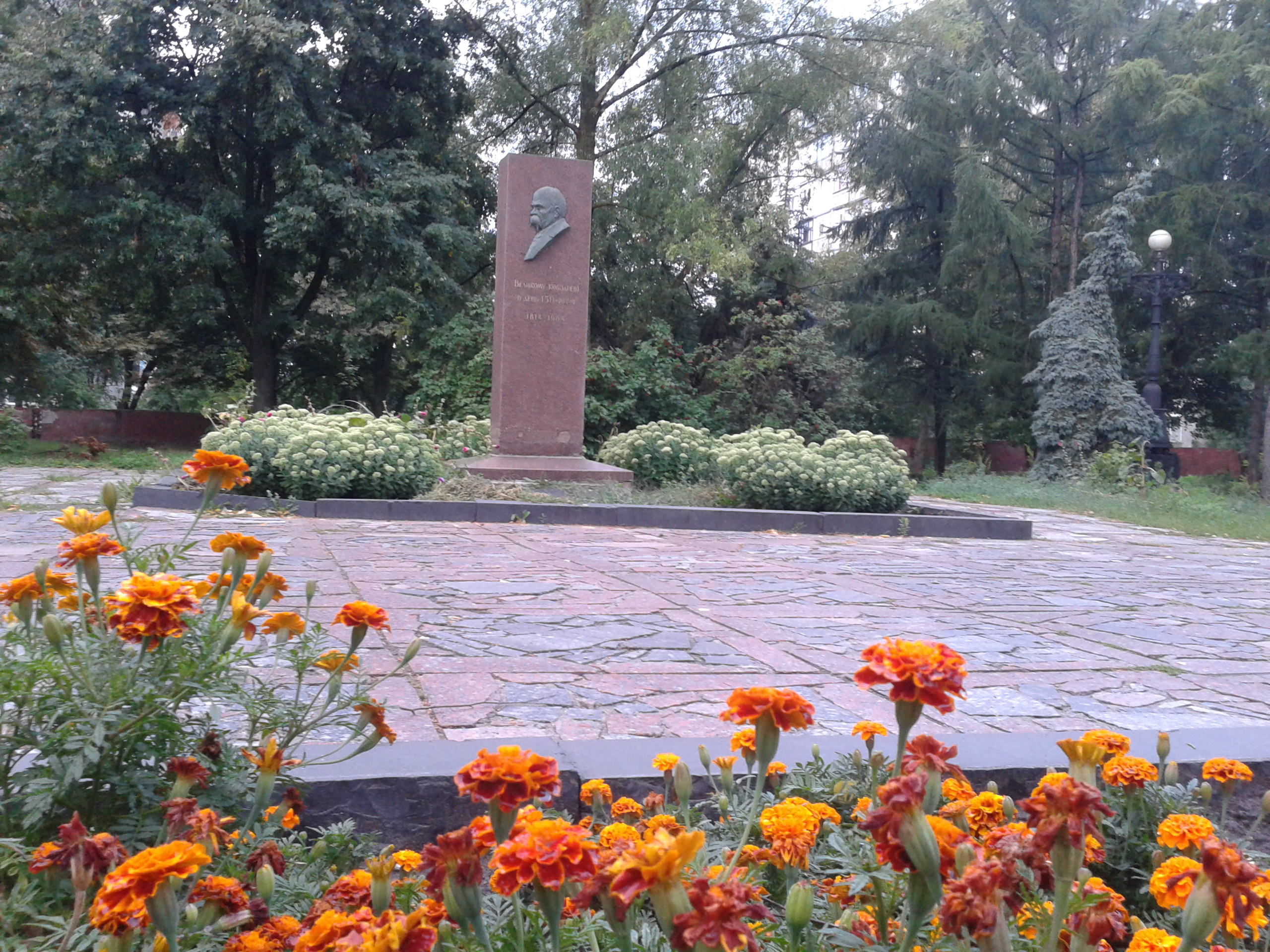 Пам’ятний знак Т.Г.Шевченку